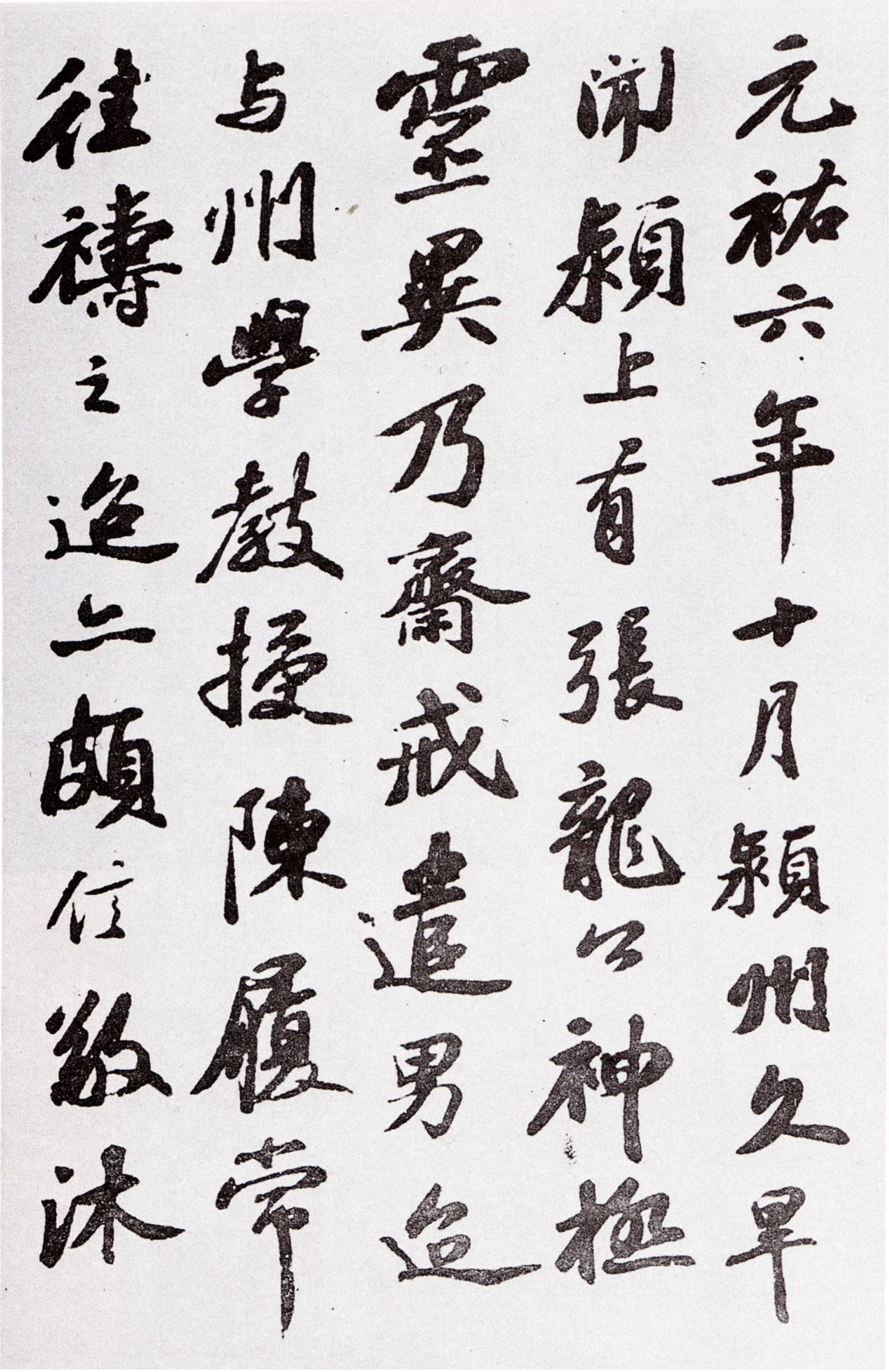 中文（中国大陆）: 苏轼《颍州祈雨帖》